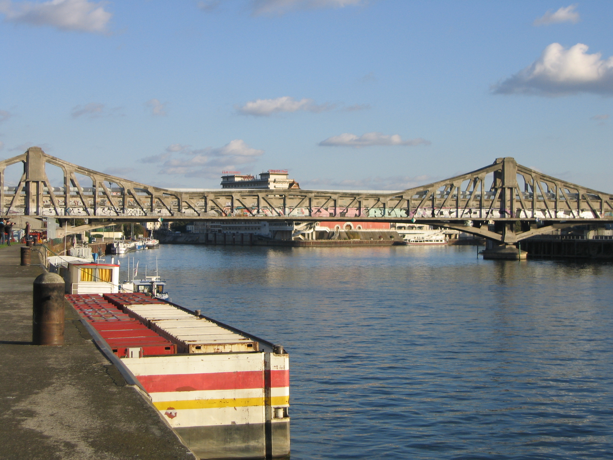 La confluence de la Marne et de la Seine à Alfortville.